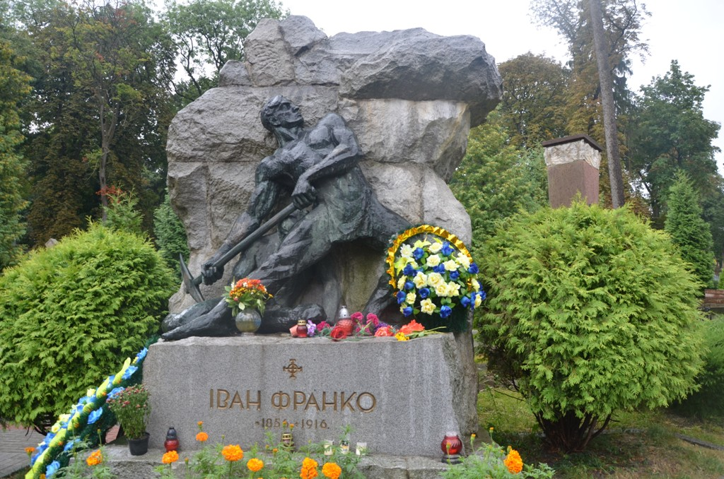 La tumba de Iván Frankó en Lviv